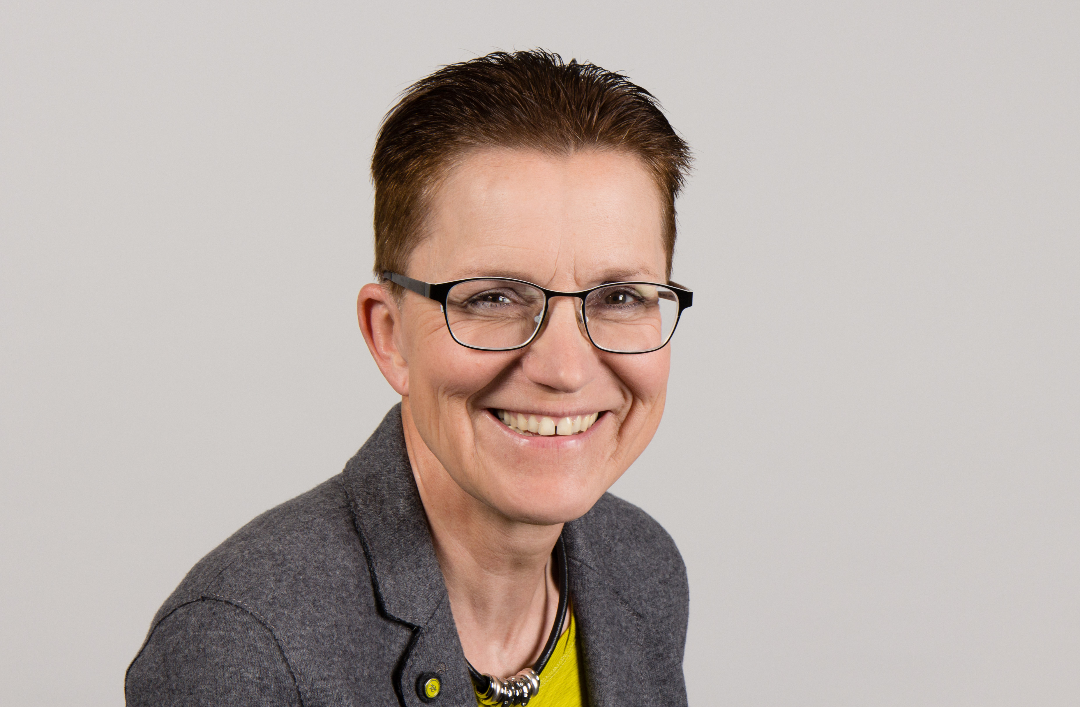 Petra Sitte * 1. Dezember 1960 in Dresden) ist eine deutsche Politikerin (Die Linke). Sie ist seit 2013 Erste Parlamentarische Geschäftsführerin der Linksfraktion im Deutschen Bundestag. Wikipedia-Bundestagsprojekt 2014 8–12 September 2014 in BerlinThis file was taken during the project “Wiki loves parliaments/Bundestag 2014” (German). Organisation: Martin Rulsch, Olaf KosinskyDesign: Martin KraftPhotography: Foto-AG Gymnasium Melle (Jan-Kristof Blömke, Lukas Eismann, Moritz Kosinsky, Laura Lessing, Karsten Mosebach, Mascha Mosebach, Teresa Schreer, Noah Sewöster, Niklas Tschöpe), Olaf Kosinsky, Martin Kraft, Harald Krichel, Steffen Prößdorf, Ralf Roletschek, Martin Rulsch, Gerd Seidel, Sven TeschkeVideo: Marc Rudnick, Manuel SchneiderEditors: Marcus Cyron, Günter Fremuth, Martin Kraft, Robin Krahl, Harald Krichel, Martin Rulsch, WikiAnikaReception: DasMonstaaa, Leonie Rabea Große, Lutheraner, Nina Möllering, Martin Rulsch, WikiAnika, Foto-AG Gymnasium MelleCosmetics: Regina Bosak, Bettina Dieguez, Sandra Kobbe, Andrea Strehlke; Irada Abdullayeva, Vivien Abelmann, Olena Engelbrecht, Sarah Fabini, Nina Magnus, Jacqueline Schmidt, Leonie Taboada, Julia Willer Usage information If you need more information how to use this file, please send an email to . Personality rights warningAlthough this work is freely licensed or in the public domain, the person(s) shown may have rights that legally restrict certain re-uses unless those depicted consent to such uses. In these cases, a model release or other evidence of consent could protect you from infringement claims.